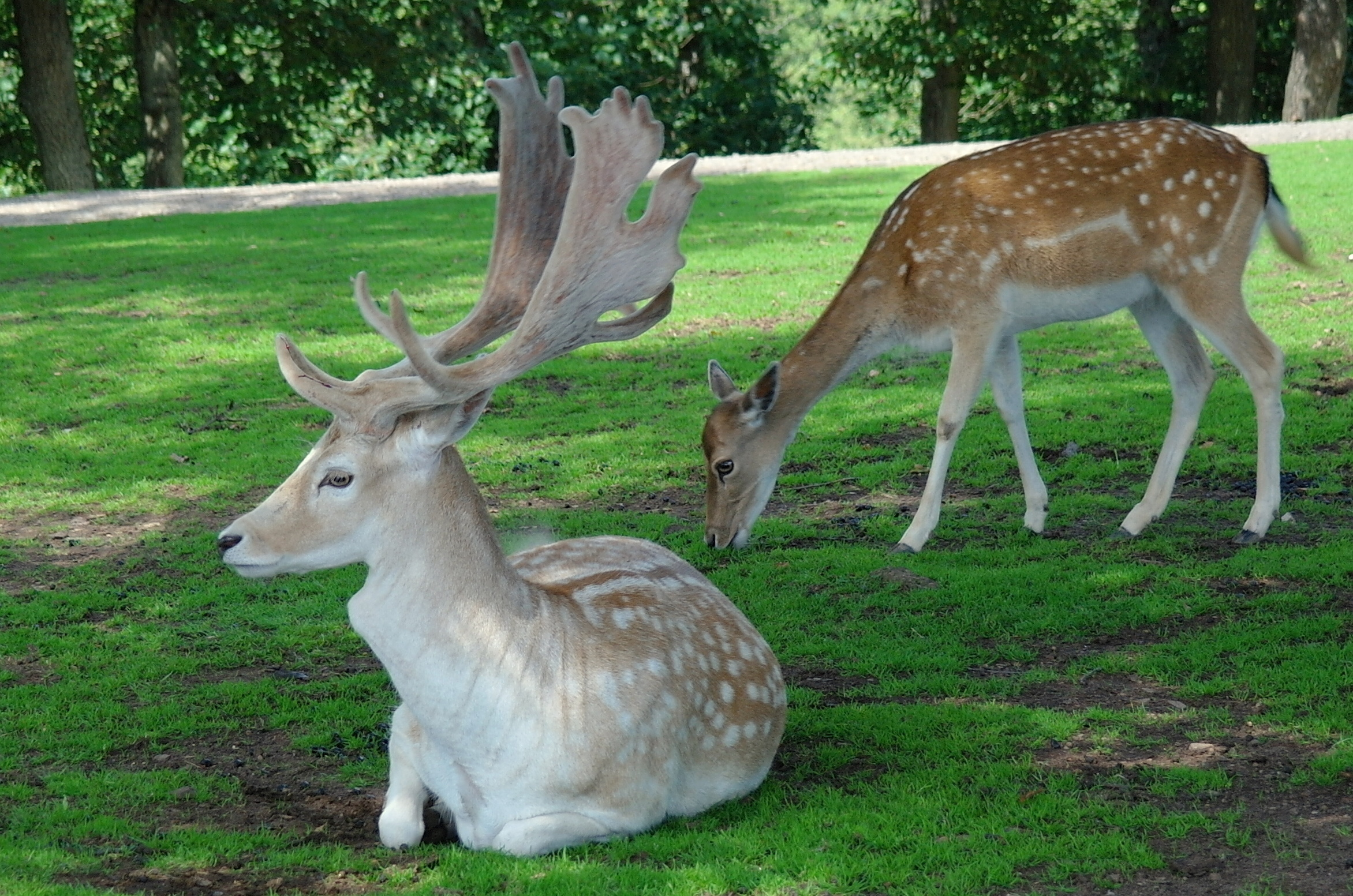 Damhirsch